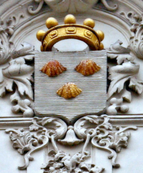 Palác Riesů ze Stallburgu erb